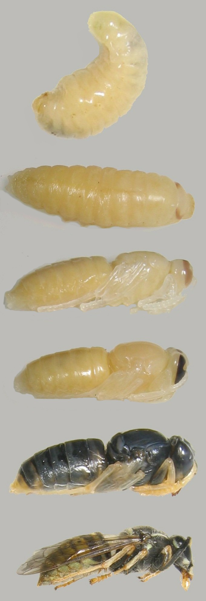 wespenpoppen in verschillende ontwikkelstadia Eigen foto's